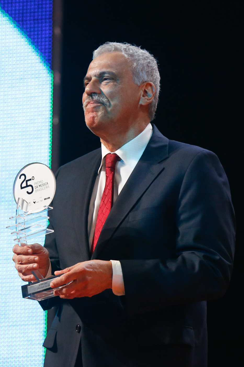 Categoria Canção “Popular” - Projeto especial – Caymmi durante o 25o Premio da Musica Brasileira no Theatro Municipal. Foto: Roberto Filho (14/05/14)